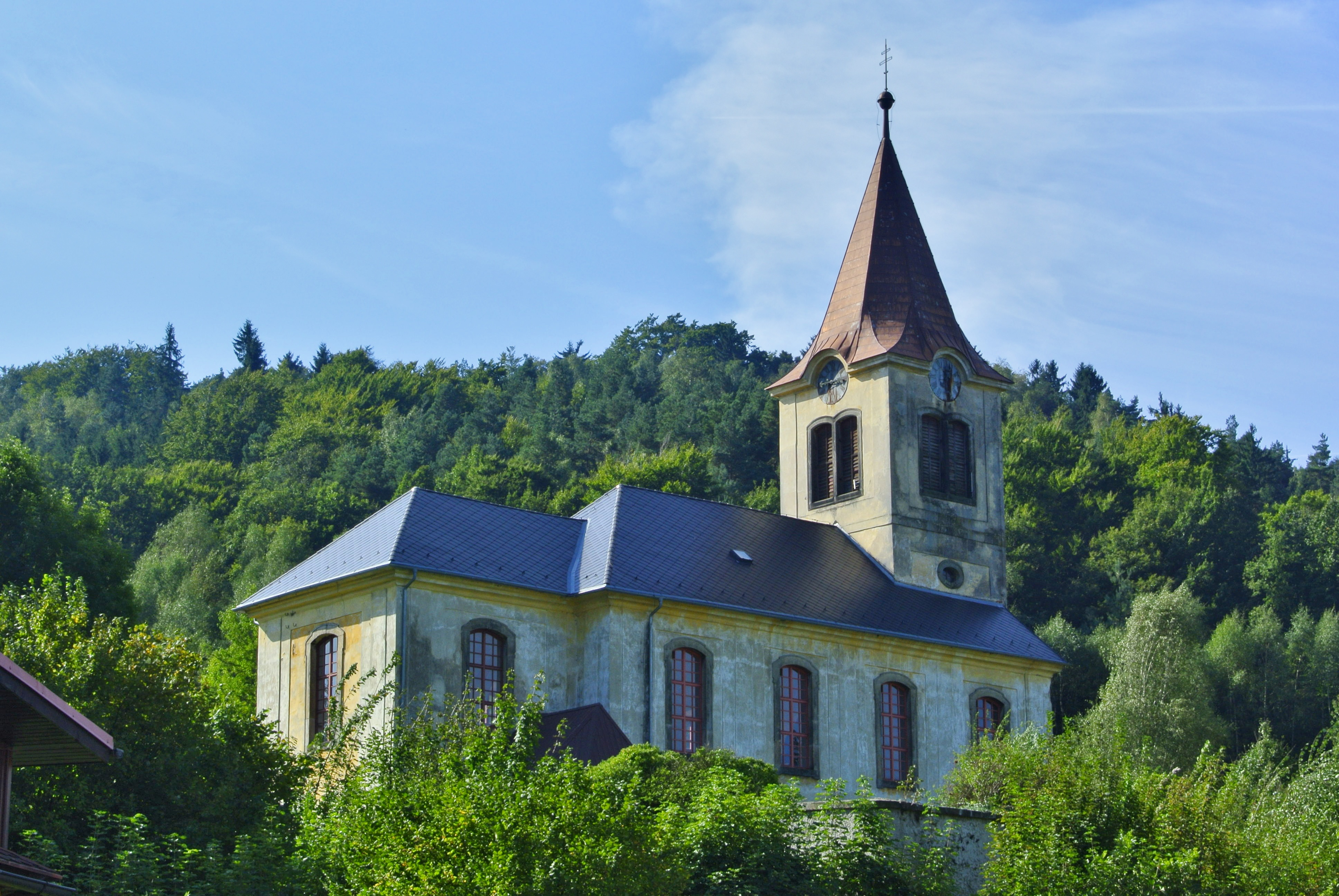 Kostel svatého Pankráce, jihozápadně od průjezdní komunikace, st. 88, pp. 101, Jítrava.